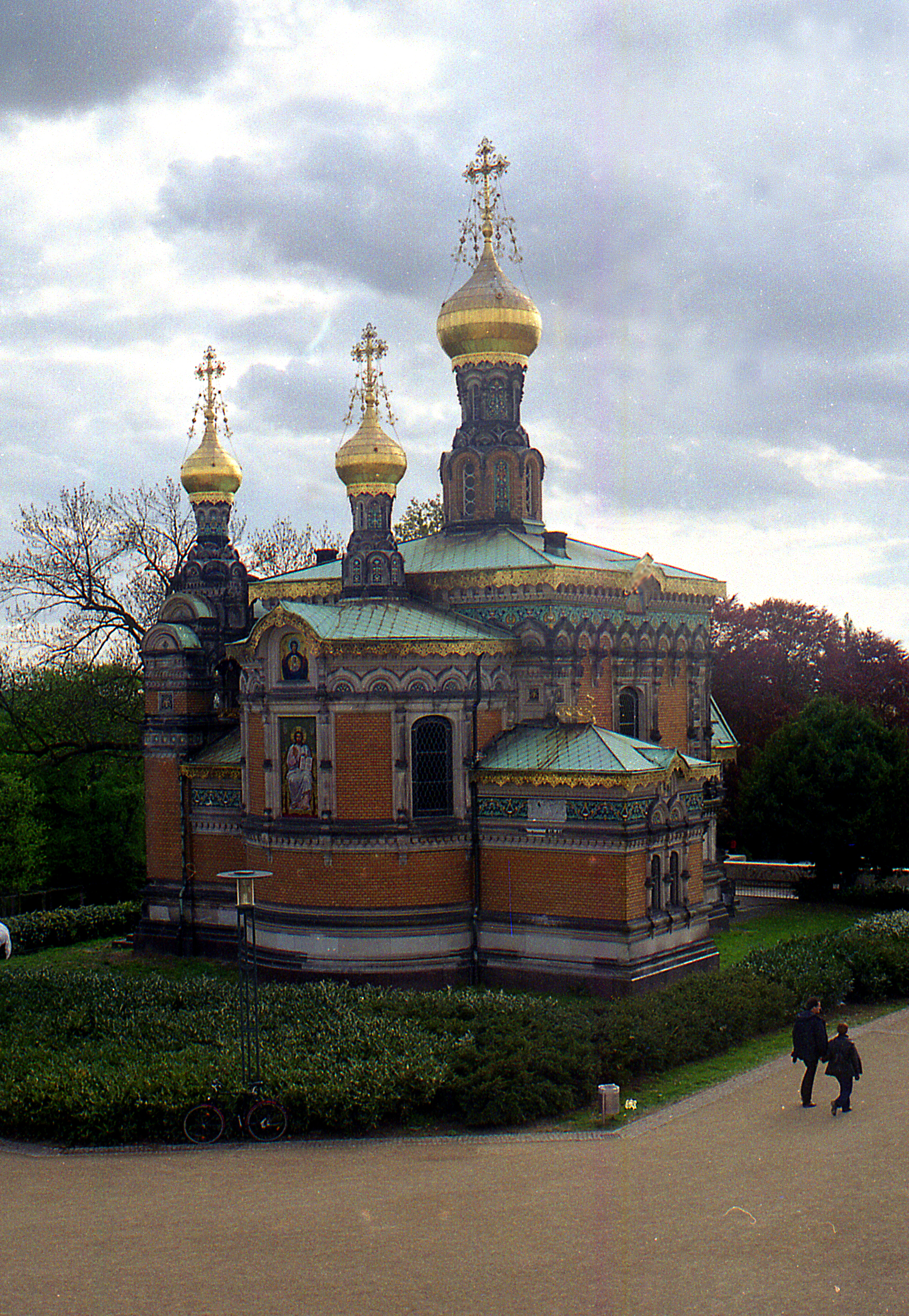 Дармштадт. Русская православная церковь.